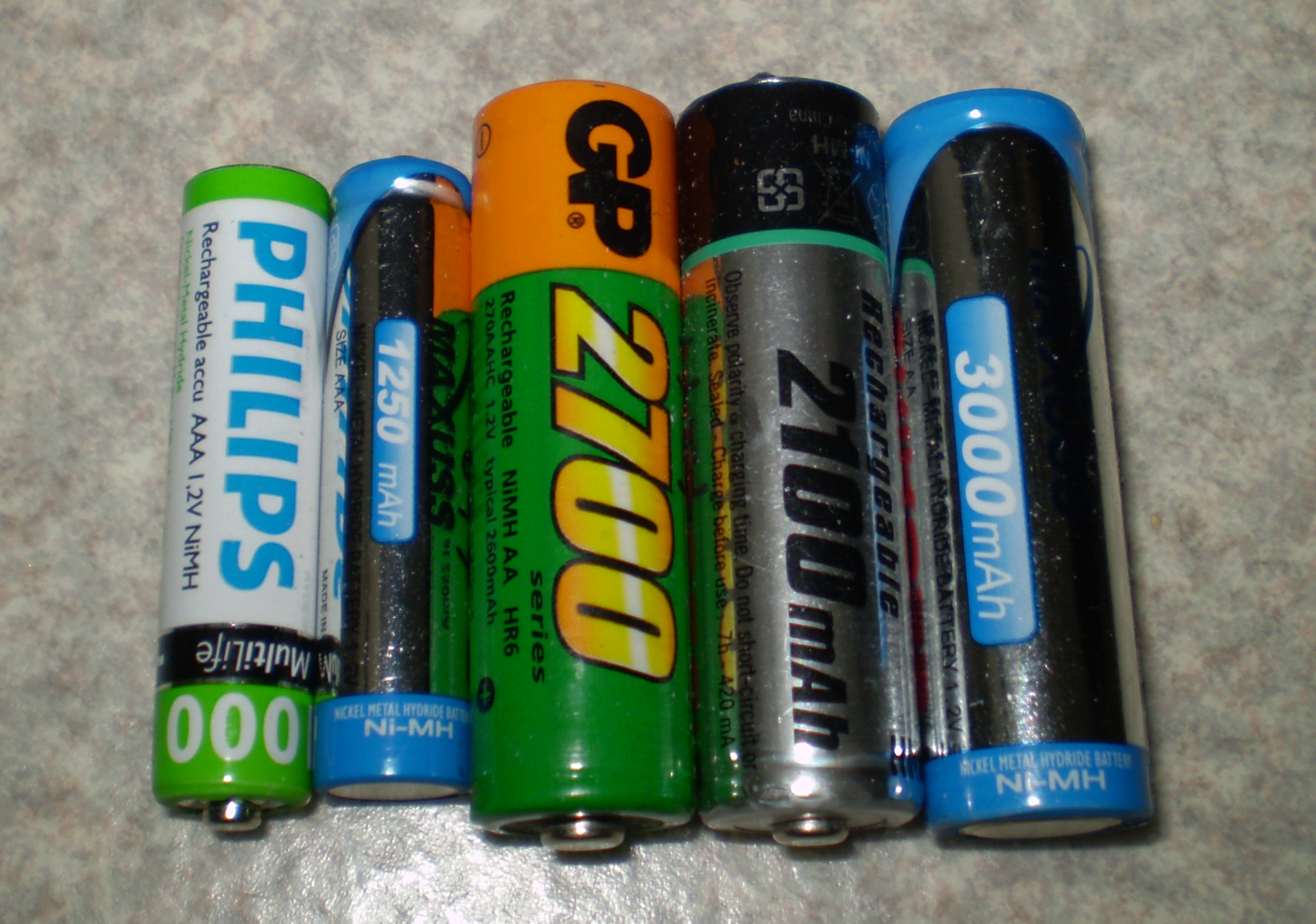 AAA- ja AA-kokoisia NiMH-akkuja